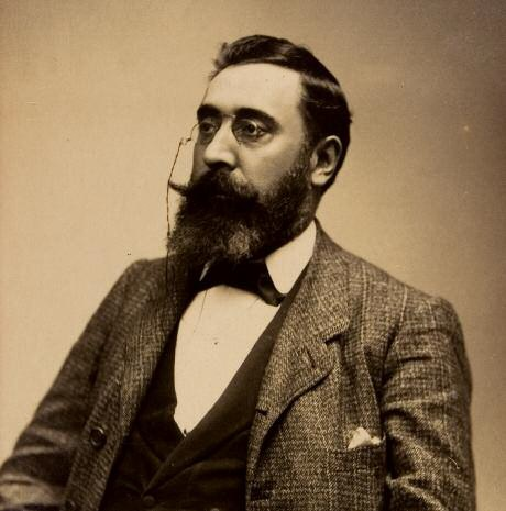 Imaxe dixital provinte da Homenaxe a Curros Enríquez no centenario do seu pasamento, derivada do retrato a Curros Enríquez realizada a finais do século XIX.